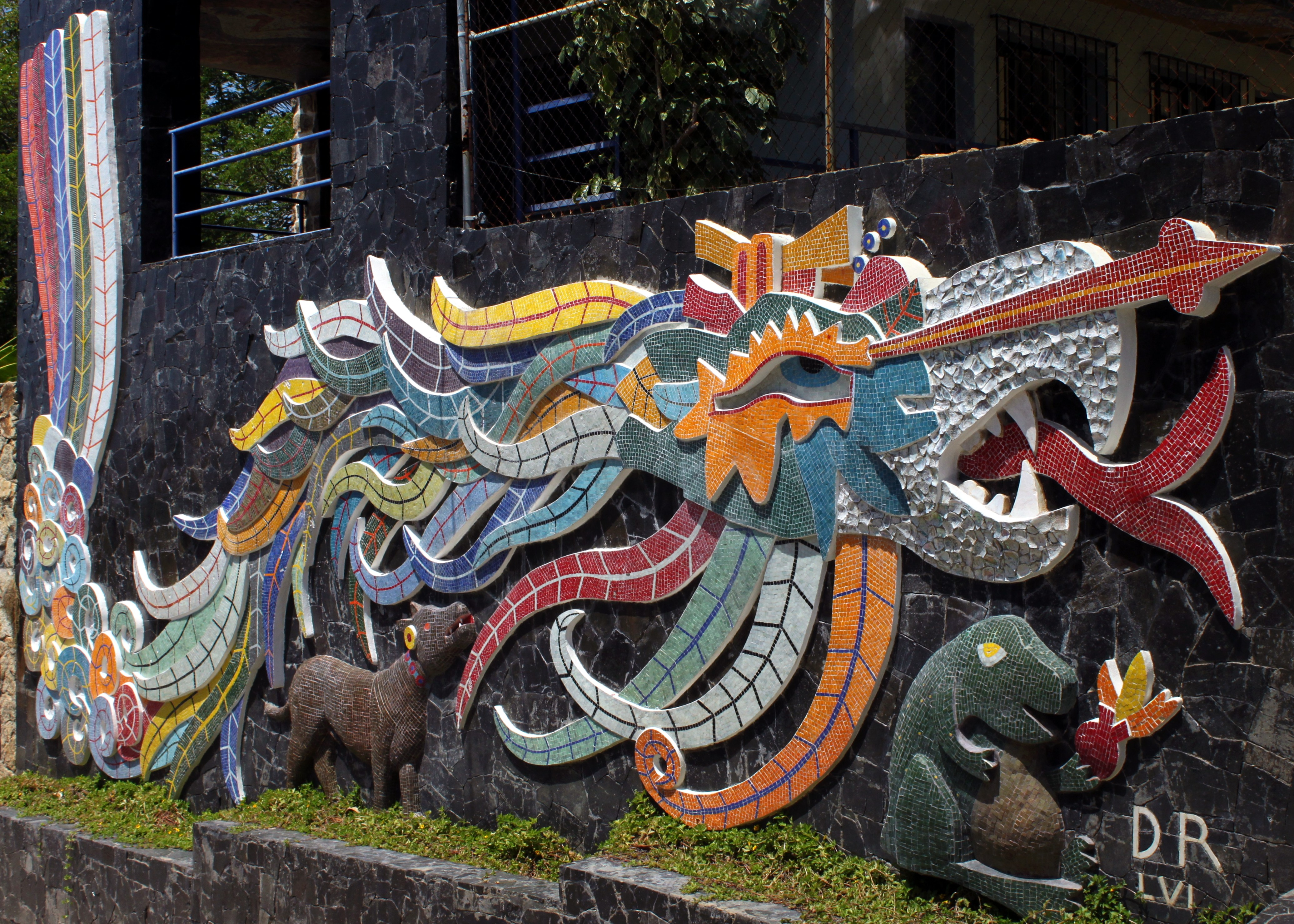 Mural de Quetzalcóatl en la Exekatlkalli (Casa de los Vientos), elaborado por Diego Rivera entre 1956 y 1957 en Acapulco, Guerrero, México.